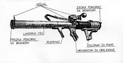 Lanzamisilis Manual M79 90 mm